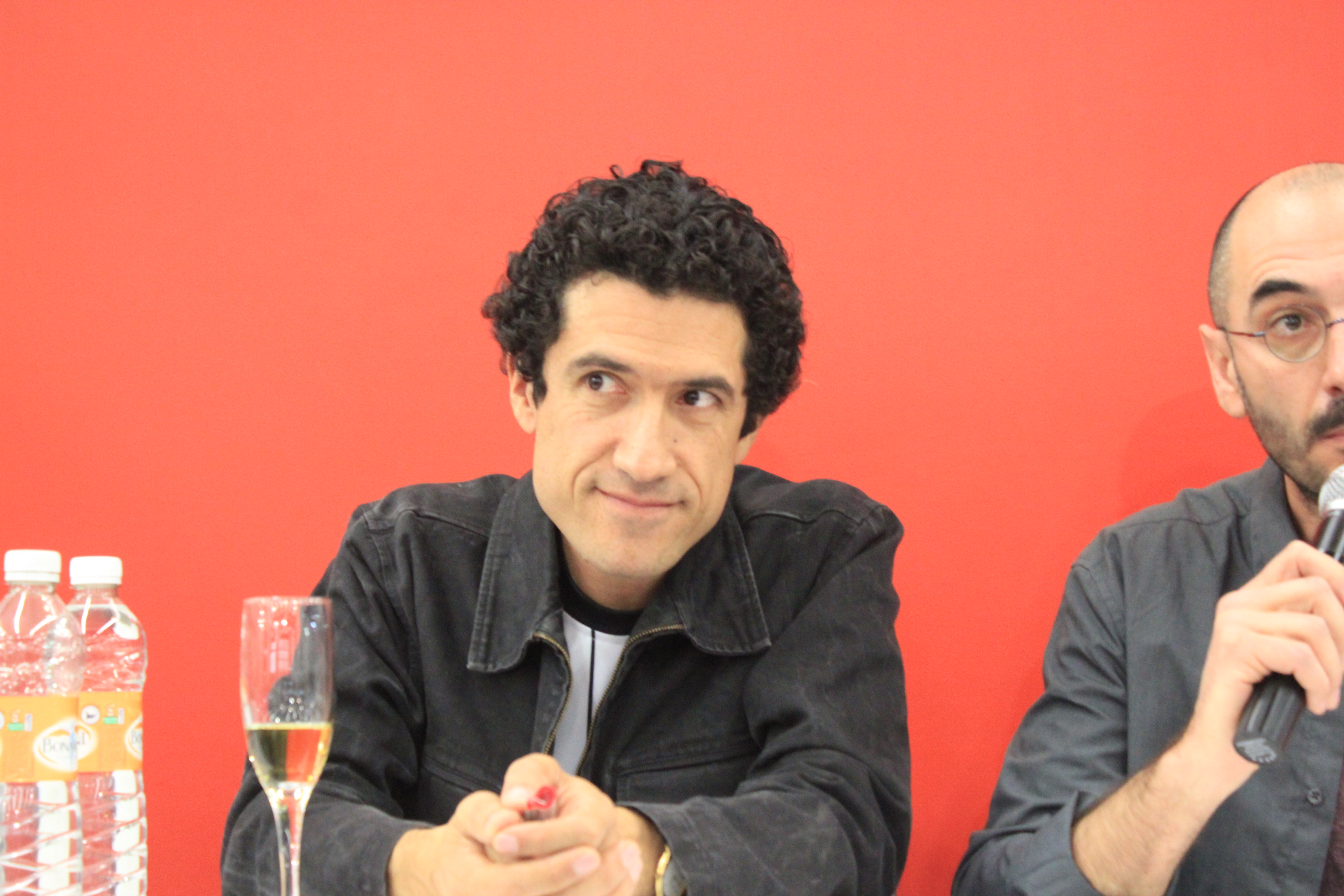 Luis Vicente de Aguinaga en la Feria del Libro de Guadalajara, en 2013